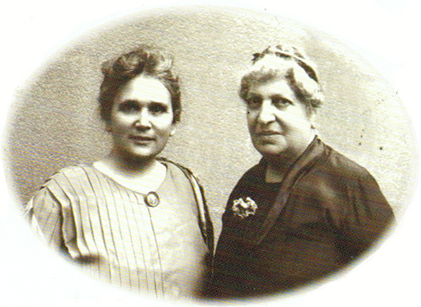 Aguliné Boyadjian et Takouhie Balthazarian, gérantes importantes de l'école Tebrotzassère.